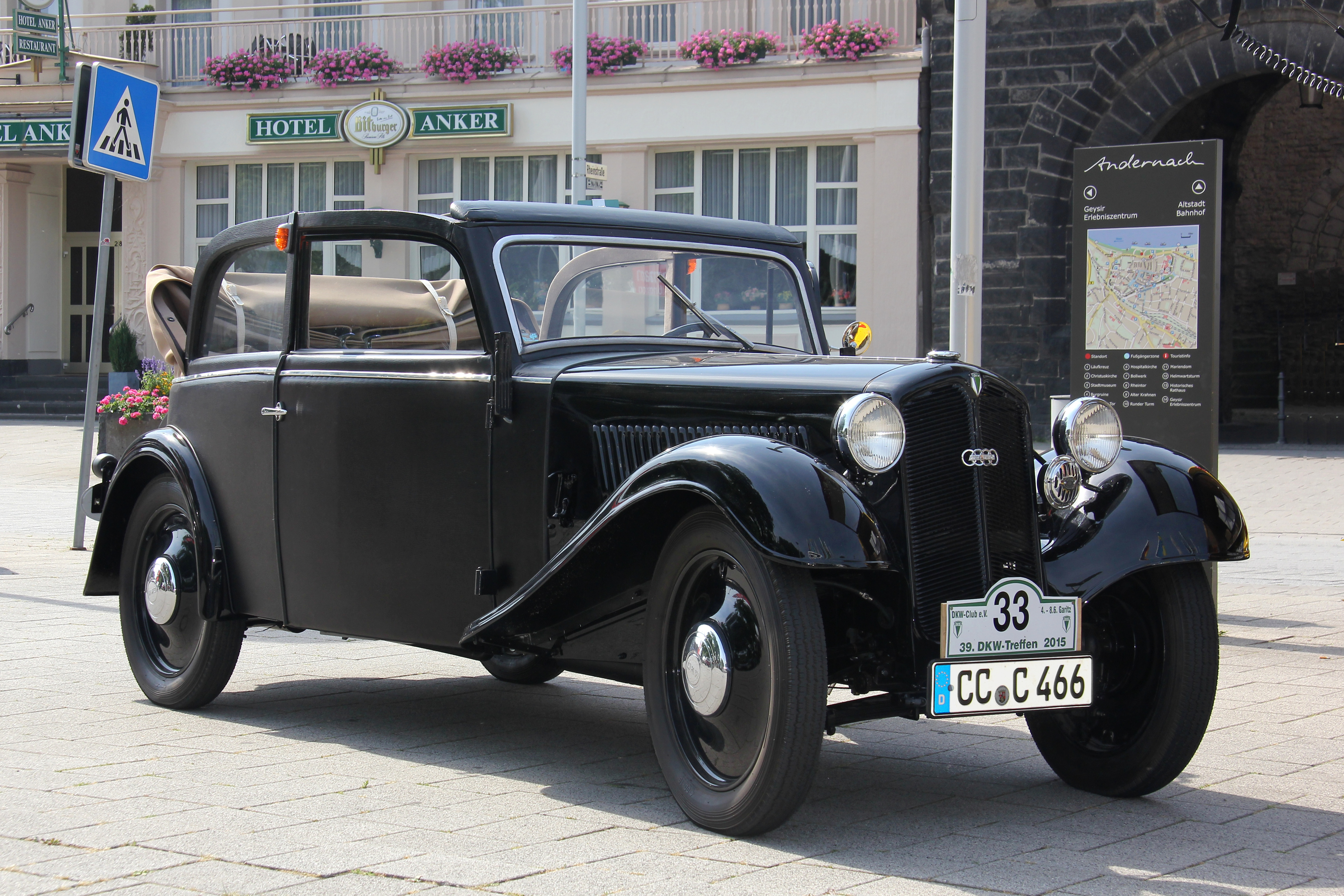 DKW F5 Cabriolimousine, Baujahr 1936 (Kennzeichen verändert)